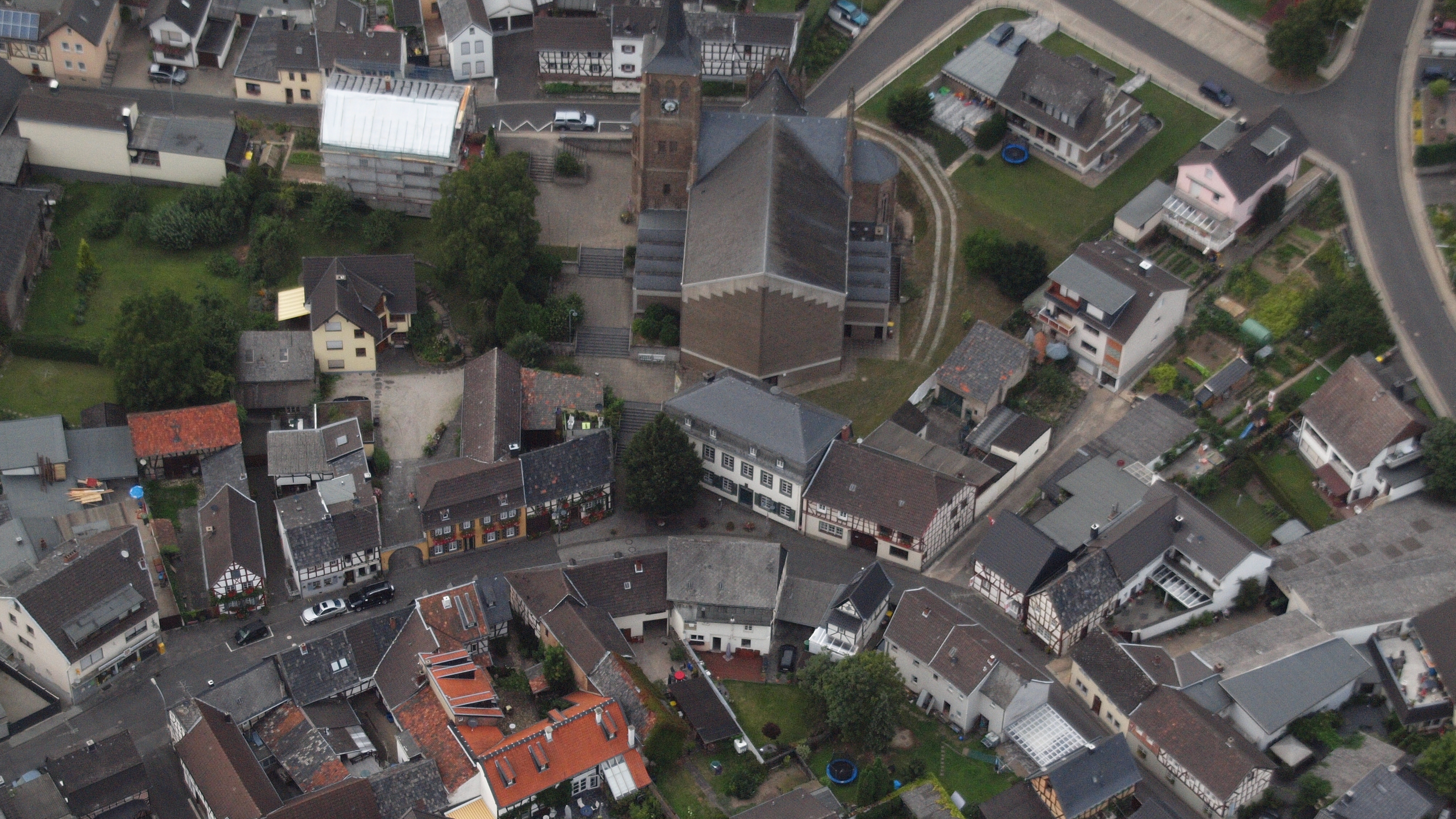 Der Ortsmittelpunkt von Bad Bodendorf: Luftaufnahme